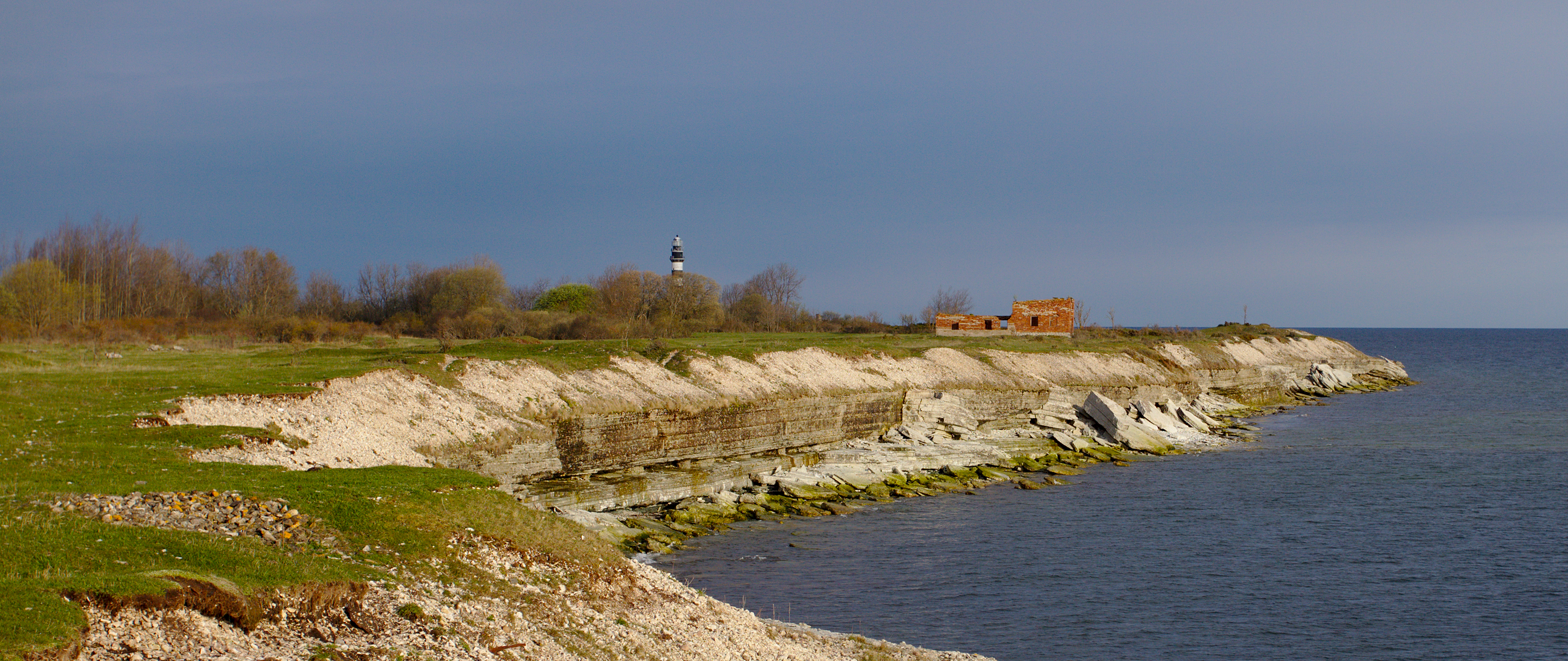 Aluspõhjakivimite paljand saare põhjaosas. Osmussaare maastikukaitseala